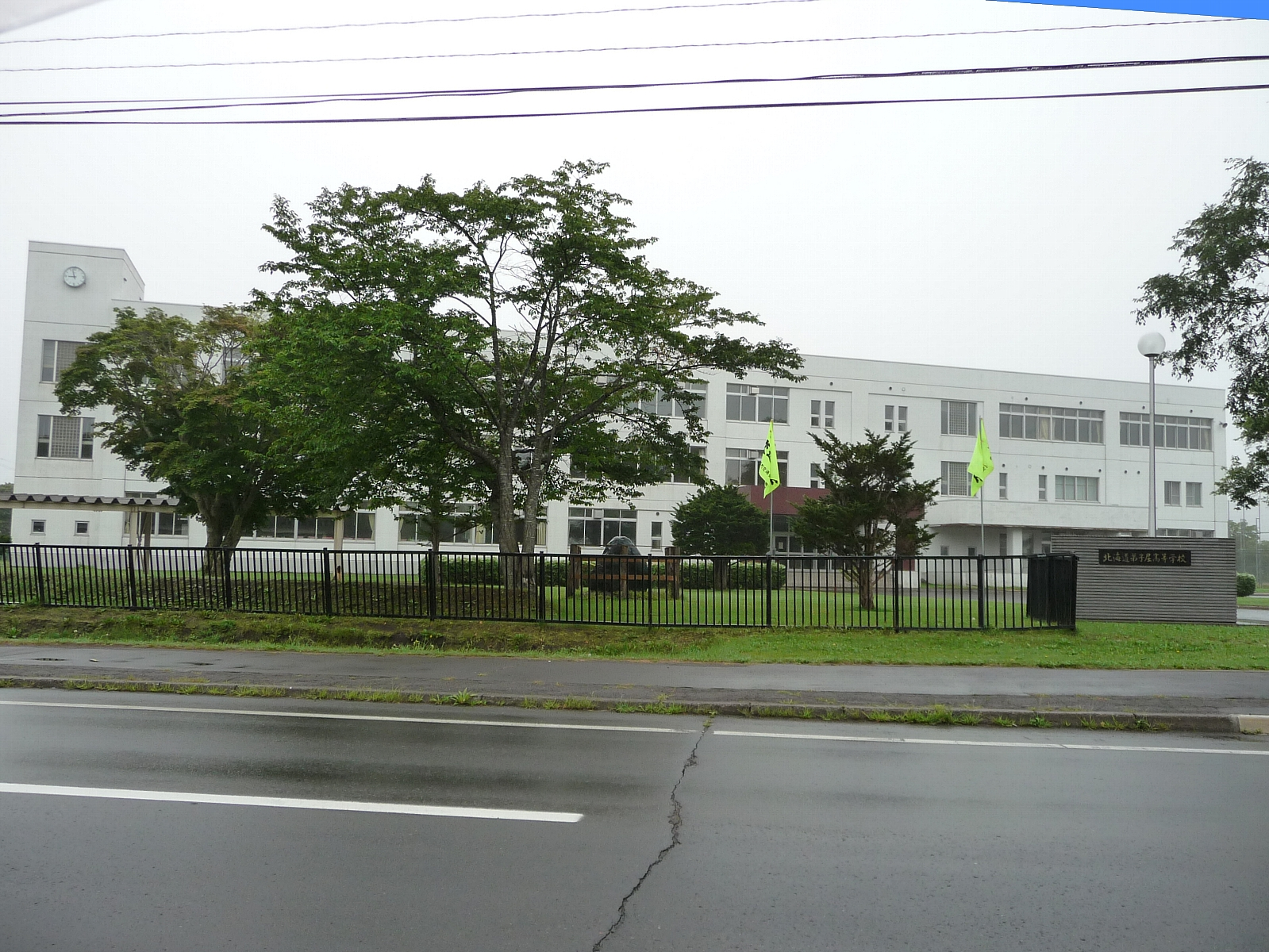 北海道弟子屈高等学校